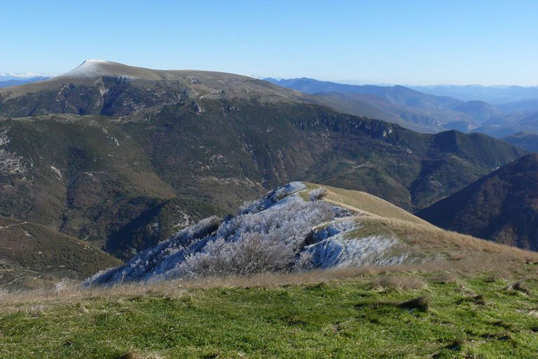 Au sommet de la Miélandre, vue directe sur la Montagne d'Angèle (1606 m).